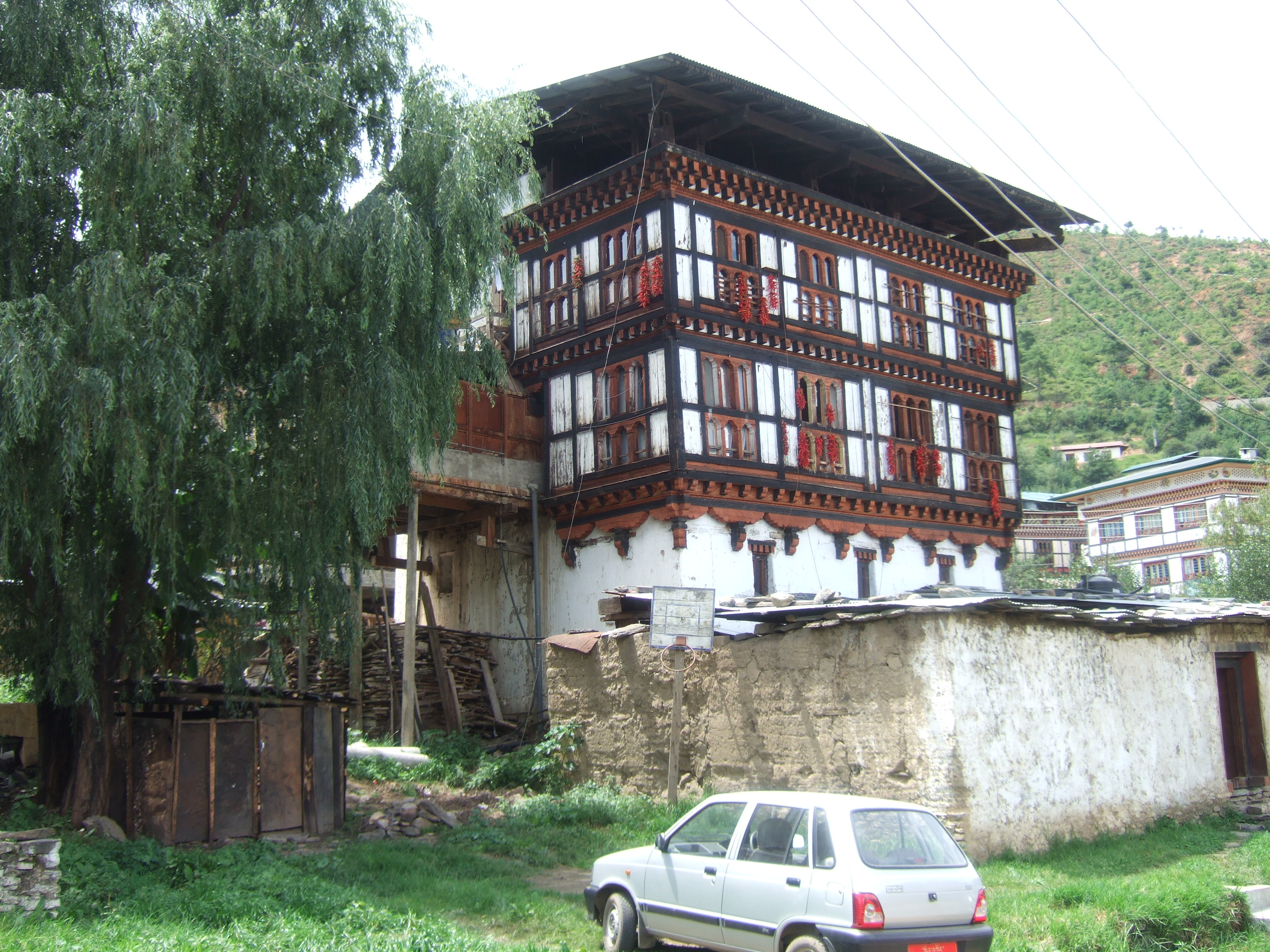 Old House, Kawajangtsa, Thimphu, Bhutan